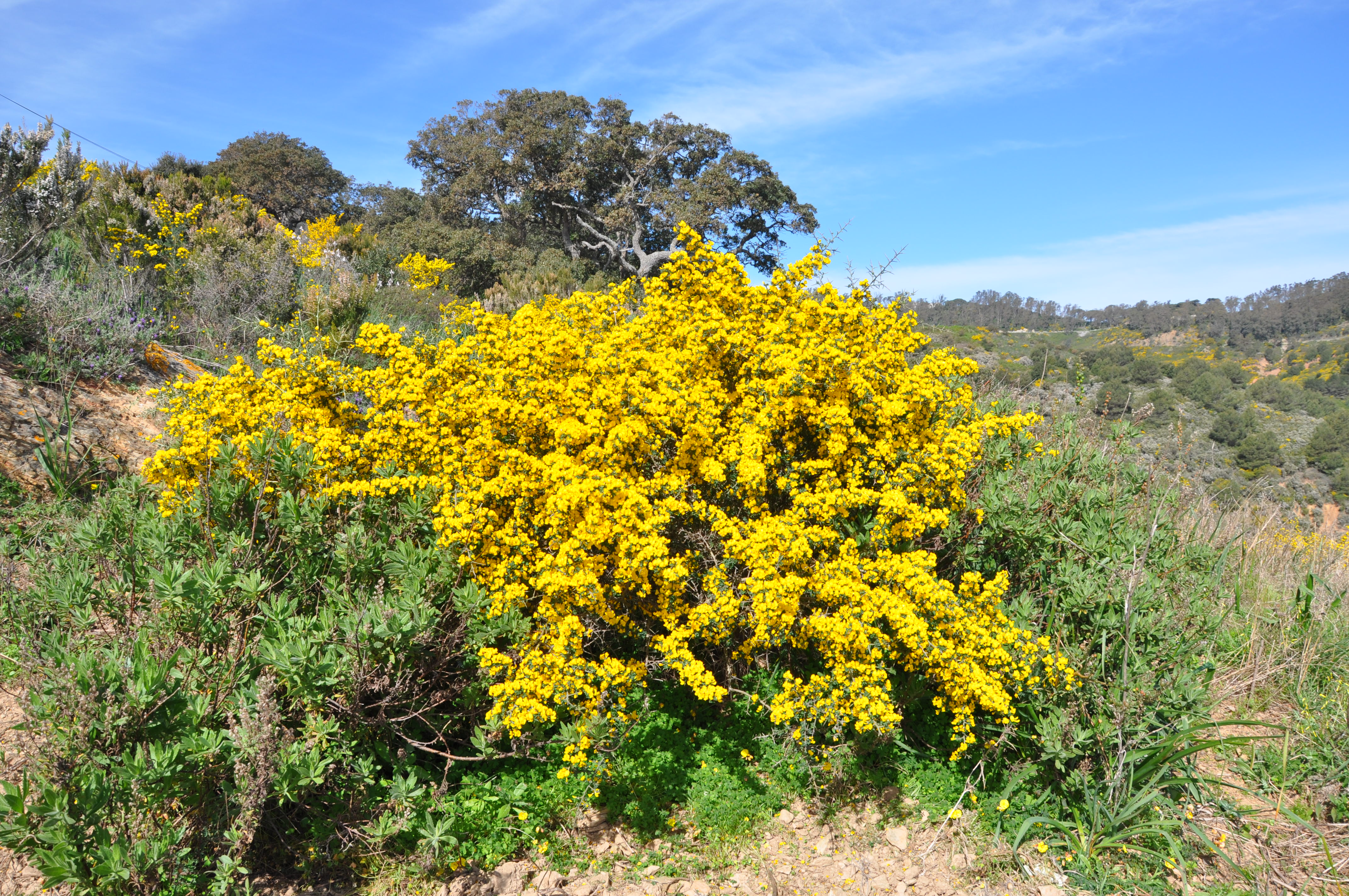 Herguén (Calycotome villosa) , noroeste de África.